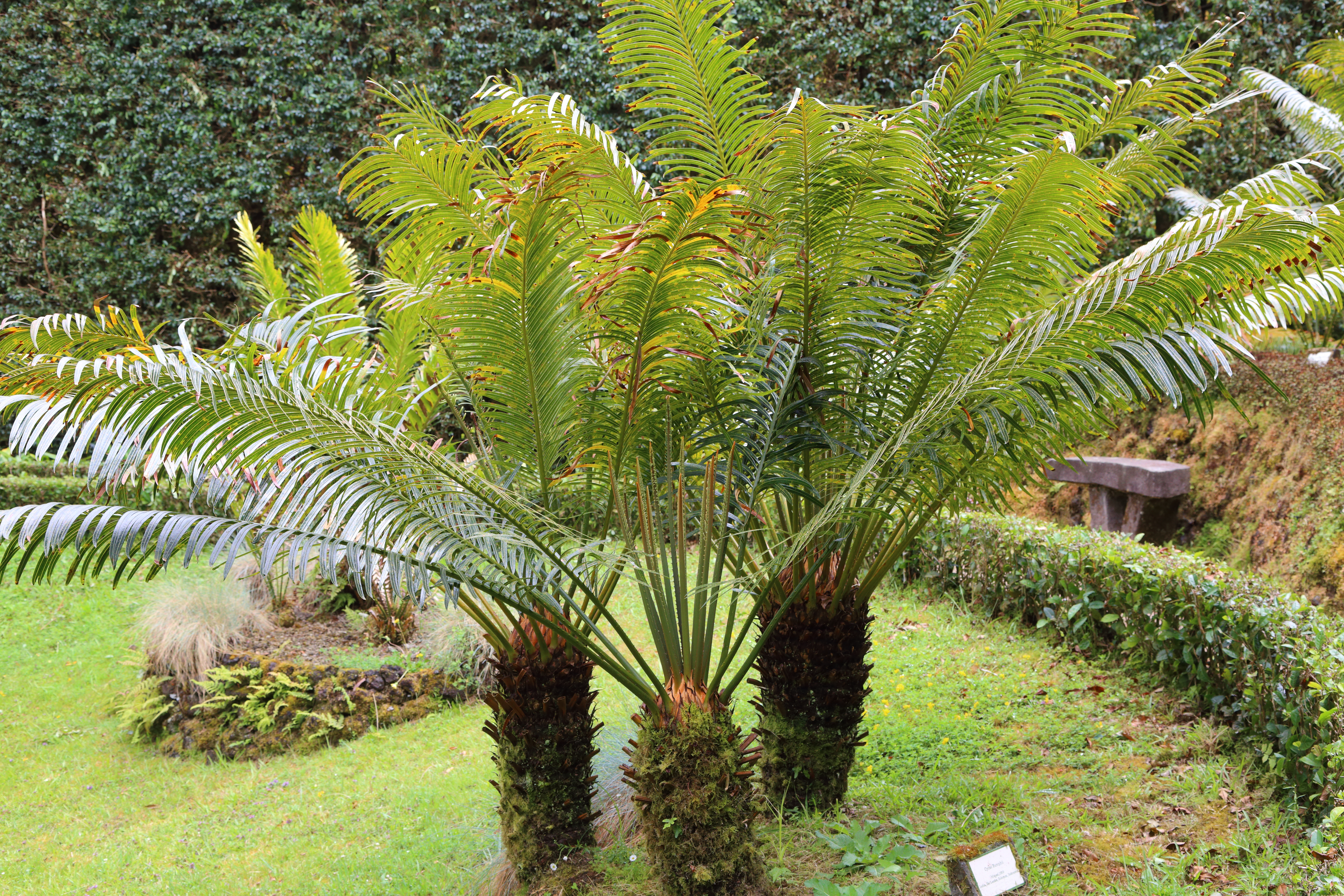 Cycas rumphii i parken Terra Nostra, Furnas, Azorerna.